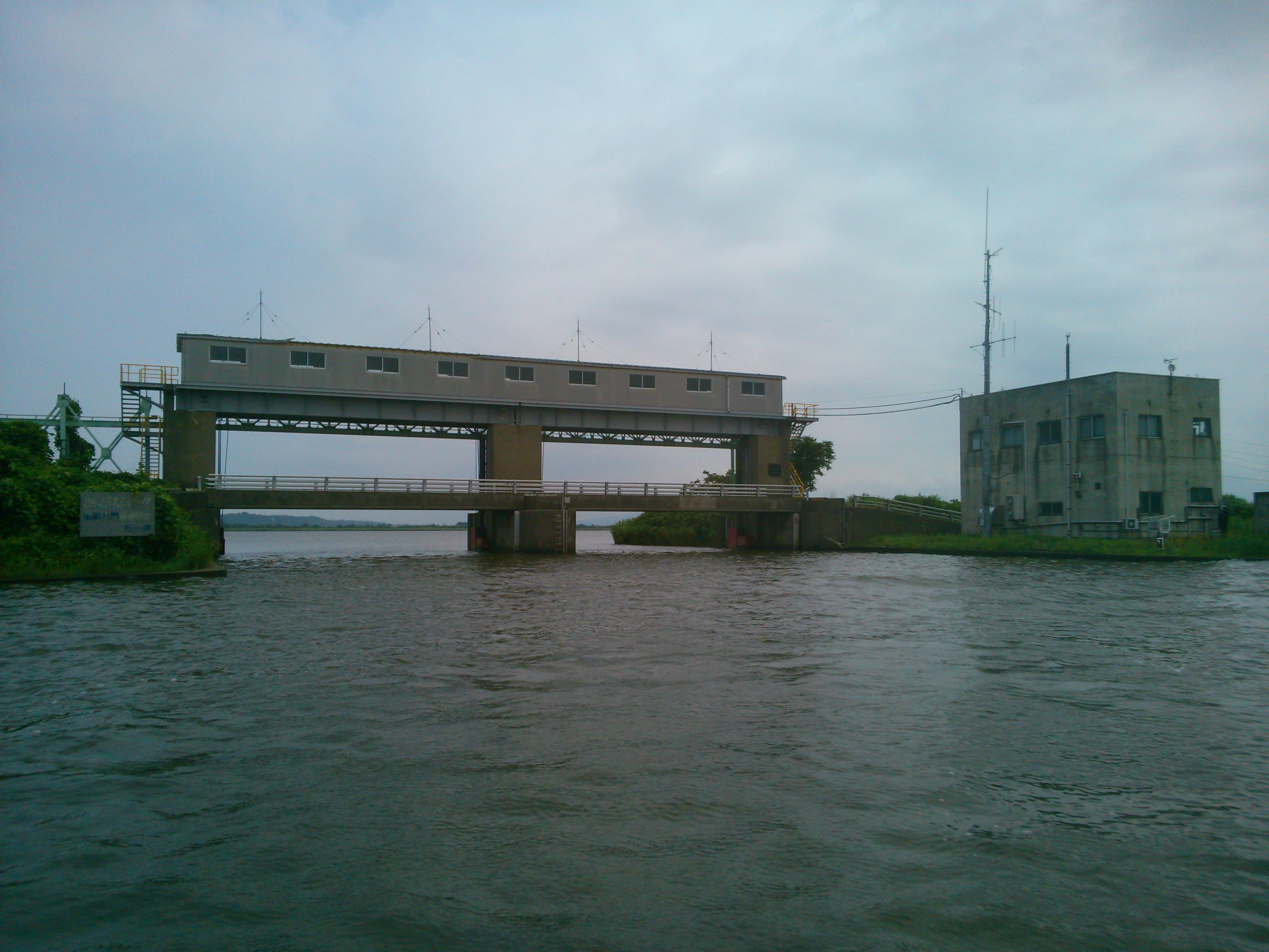 金沢港（大野川）防潮水門（金沢港側水面から防潮水門を望む）